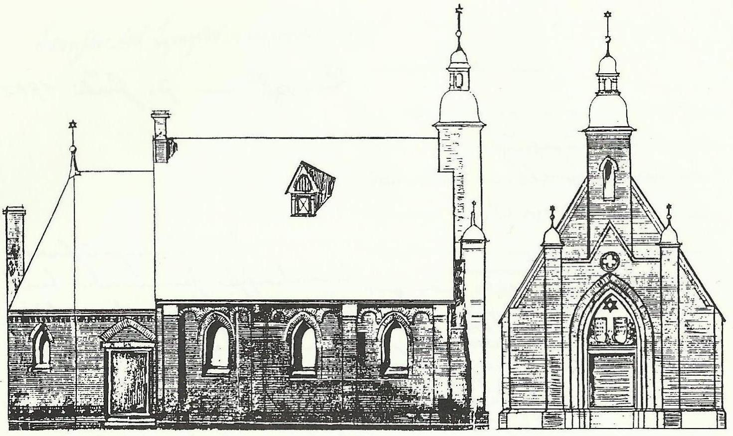 Synagoge, Honnef: Zeichnung zum Umbau im Jahre 1902